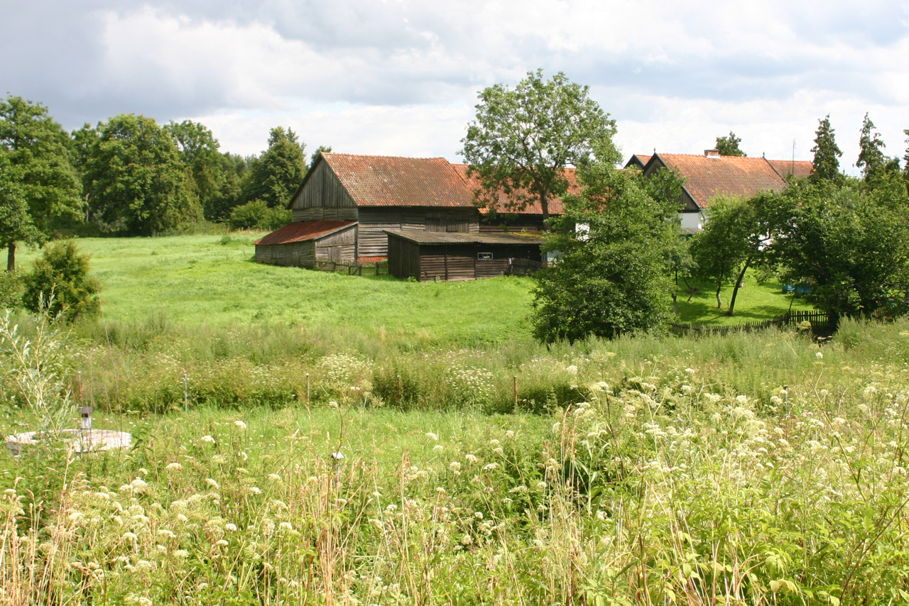 Asuny, Poland